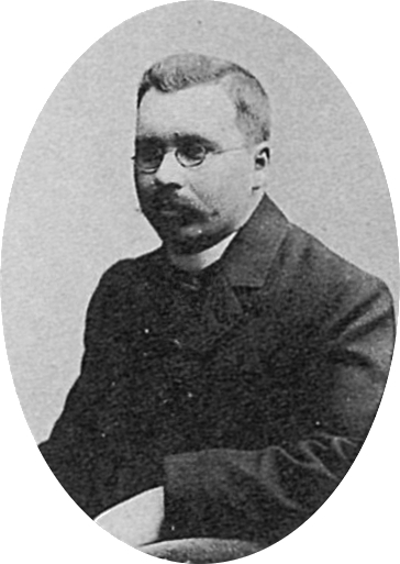 Николай Александрович Мельников, казанский земский деятель, член III Государственной думы от Казанской губернии.